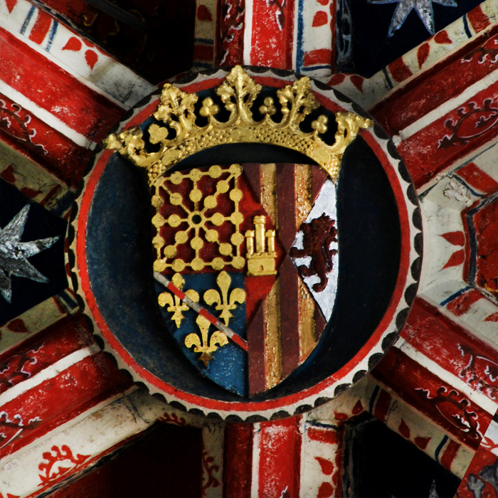 Escudo en la catedral de Pamplona.